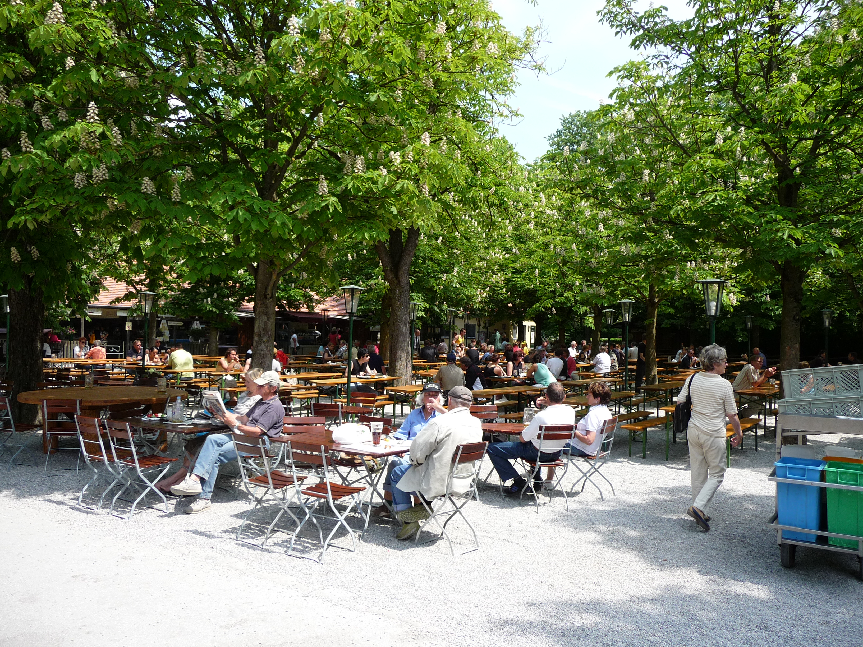 Der Biergarten der Wirtschaft „zum Aumeister“ in München